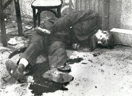 Abd al-Karim's corpse.